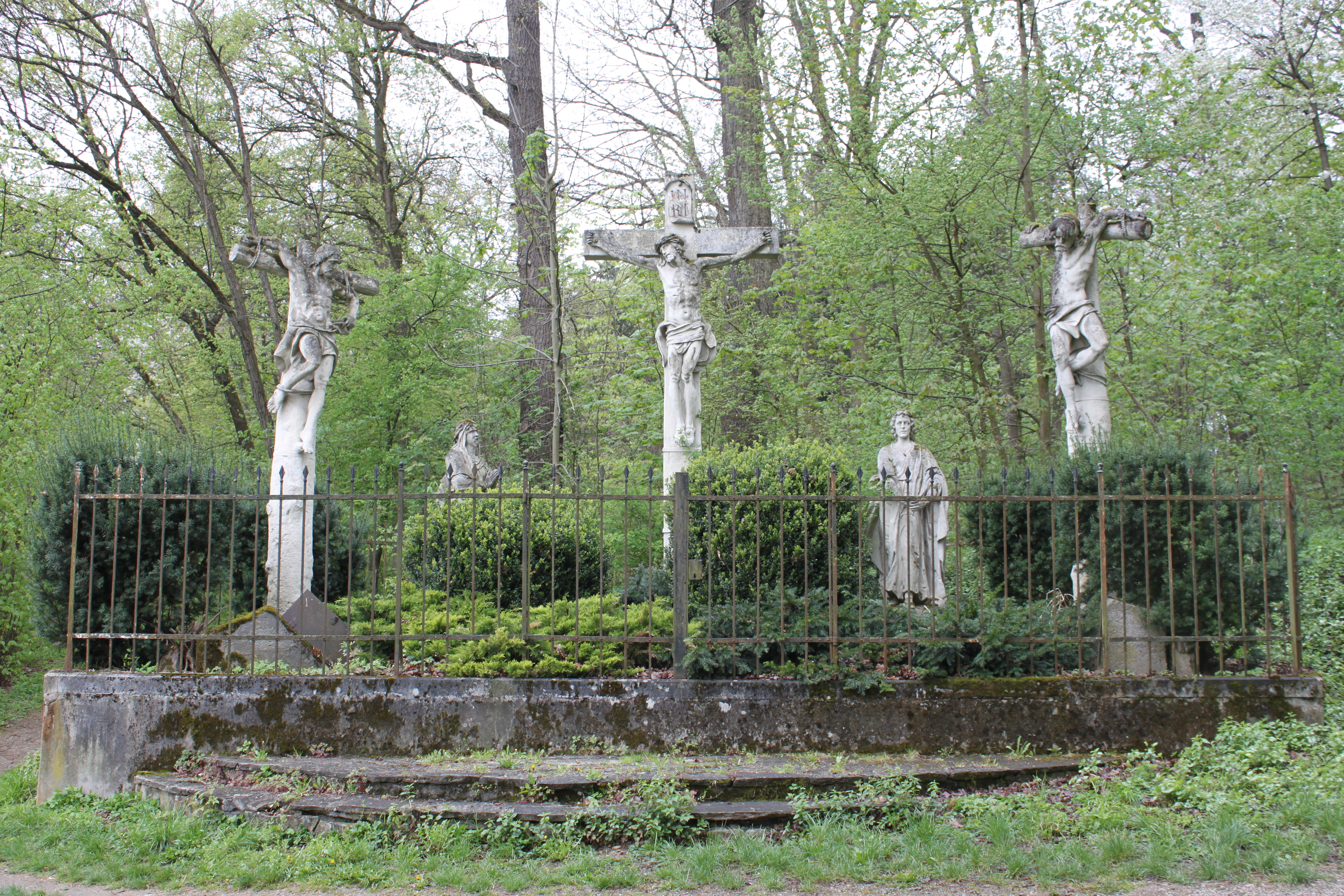 Kalvarienberg, im Stadtwald von St. Pölten, 1746 errichtet, laut Dehio Niederösterreich südlich der Donau 2003, Seite 2032